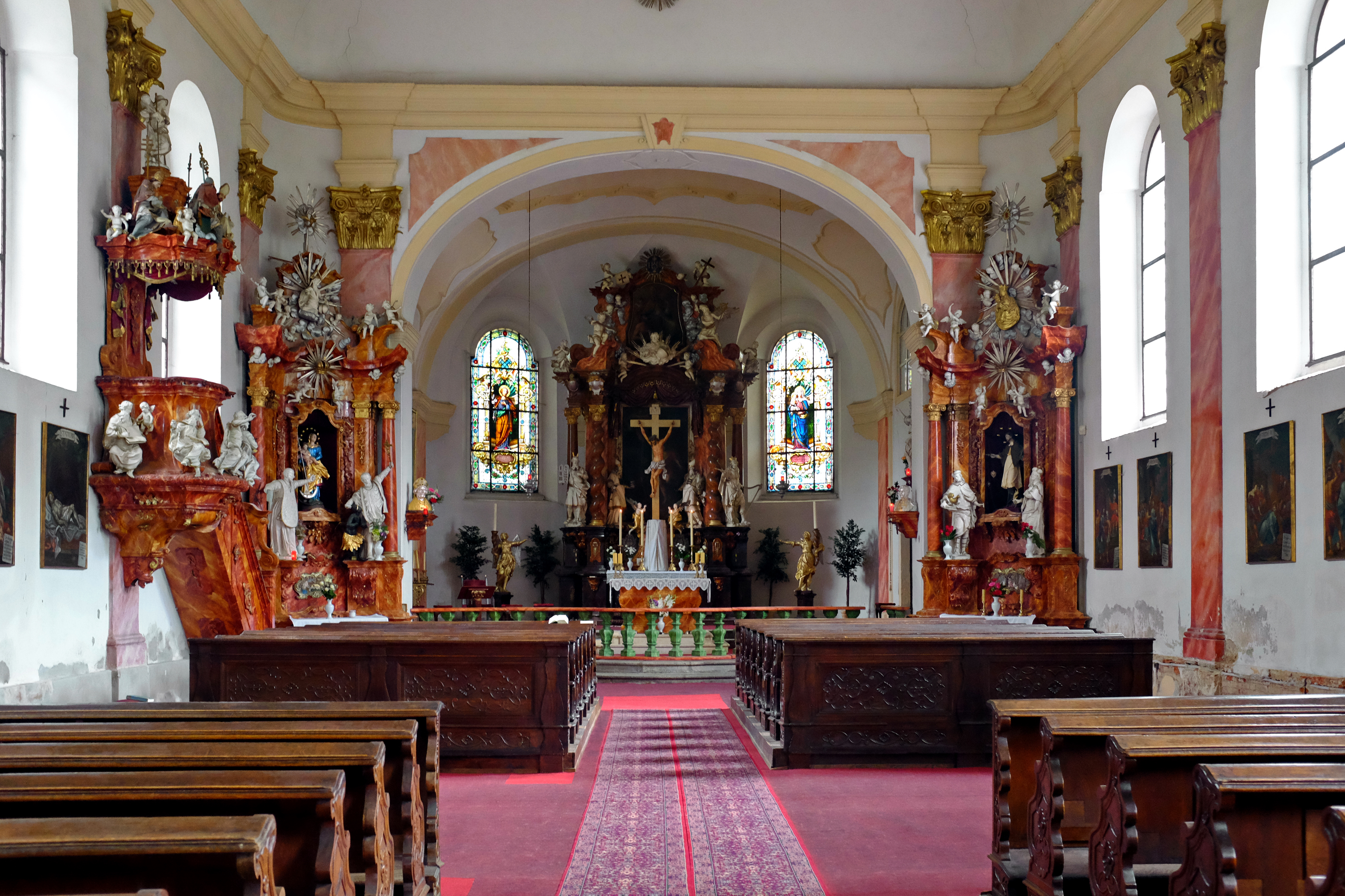 Kostel svatého Martina, Nejdek.